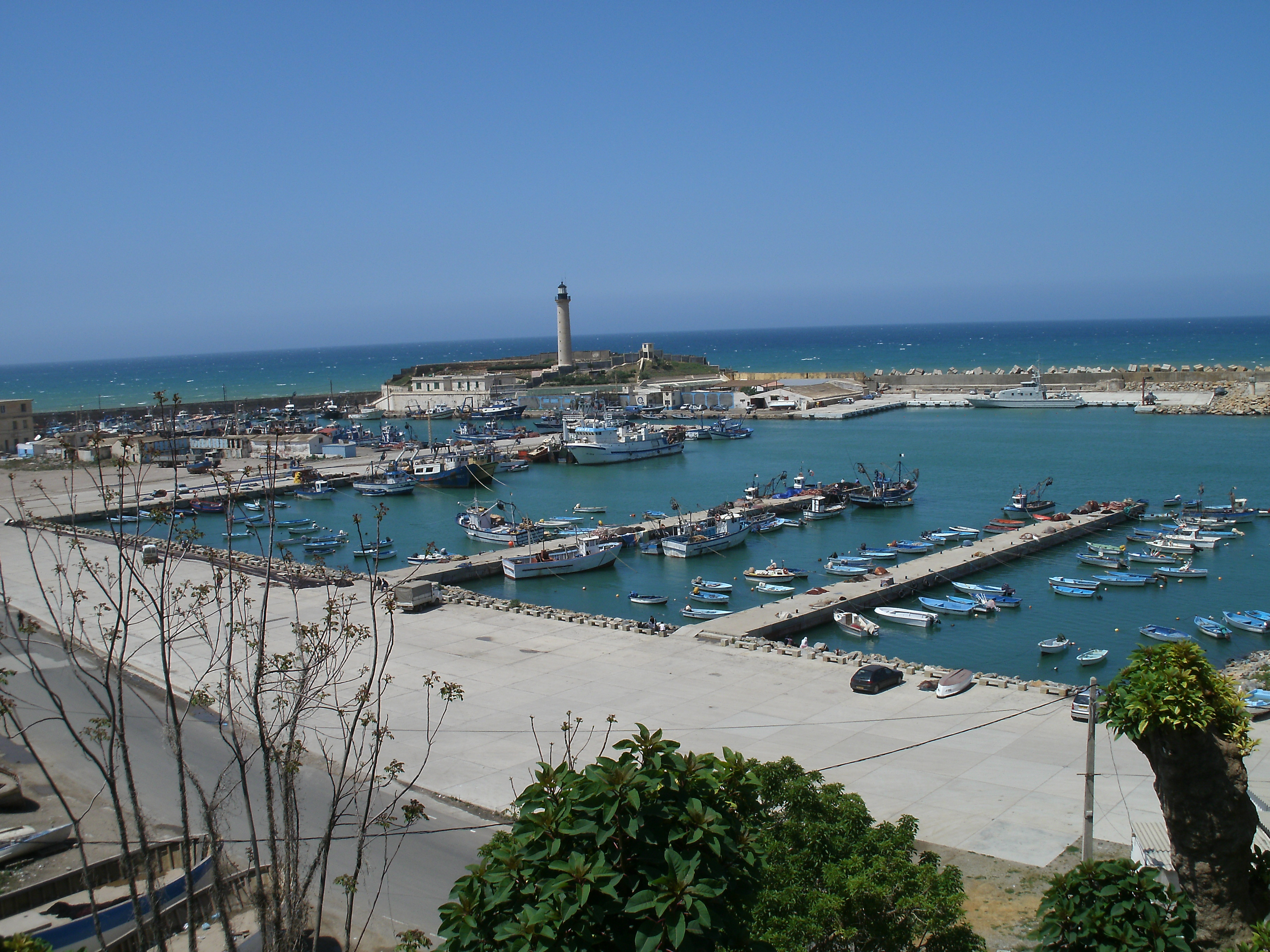 Port de Cherchell